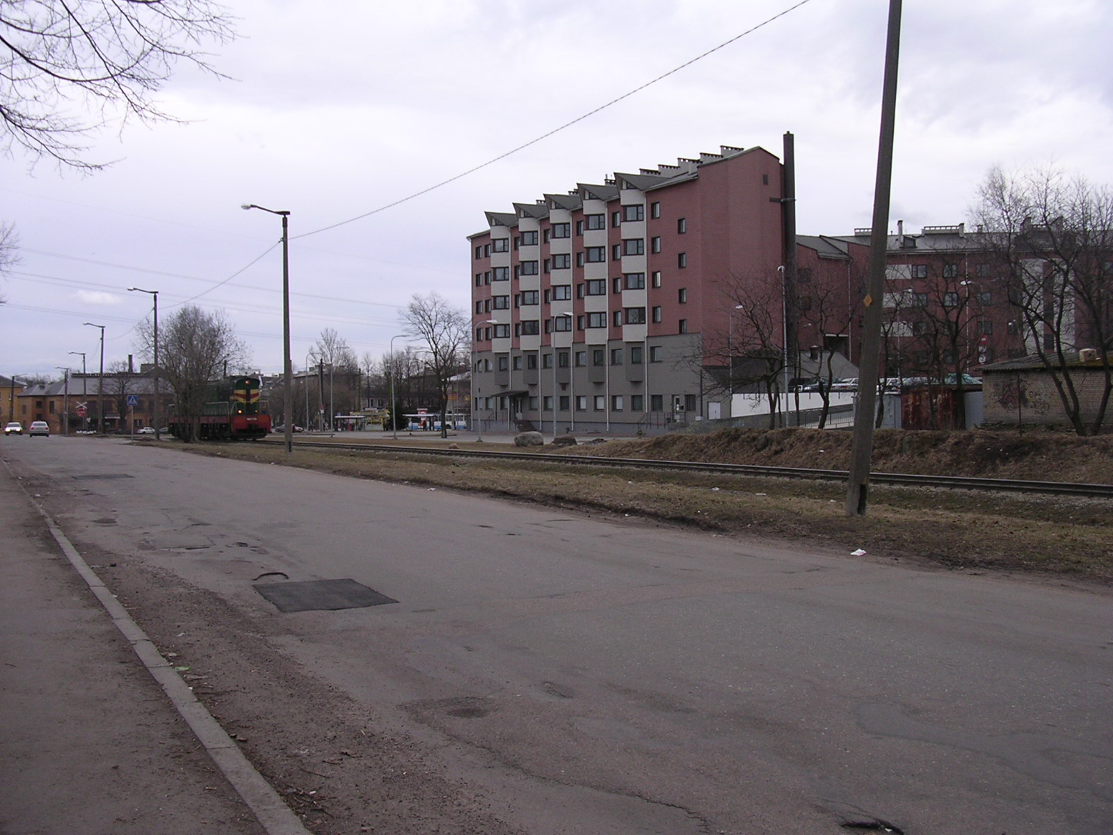 Maleva